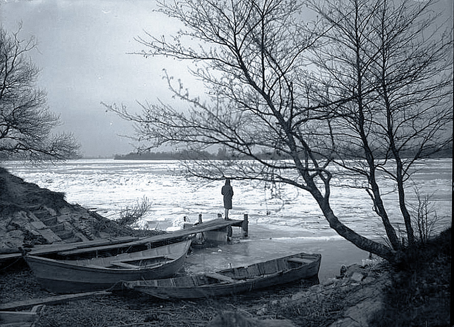 En dessous d'Arles, le Grand Rhône gelé vers 1930